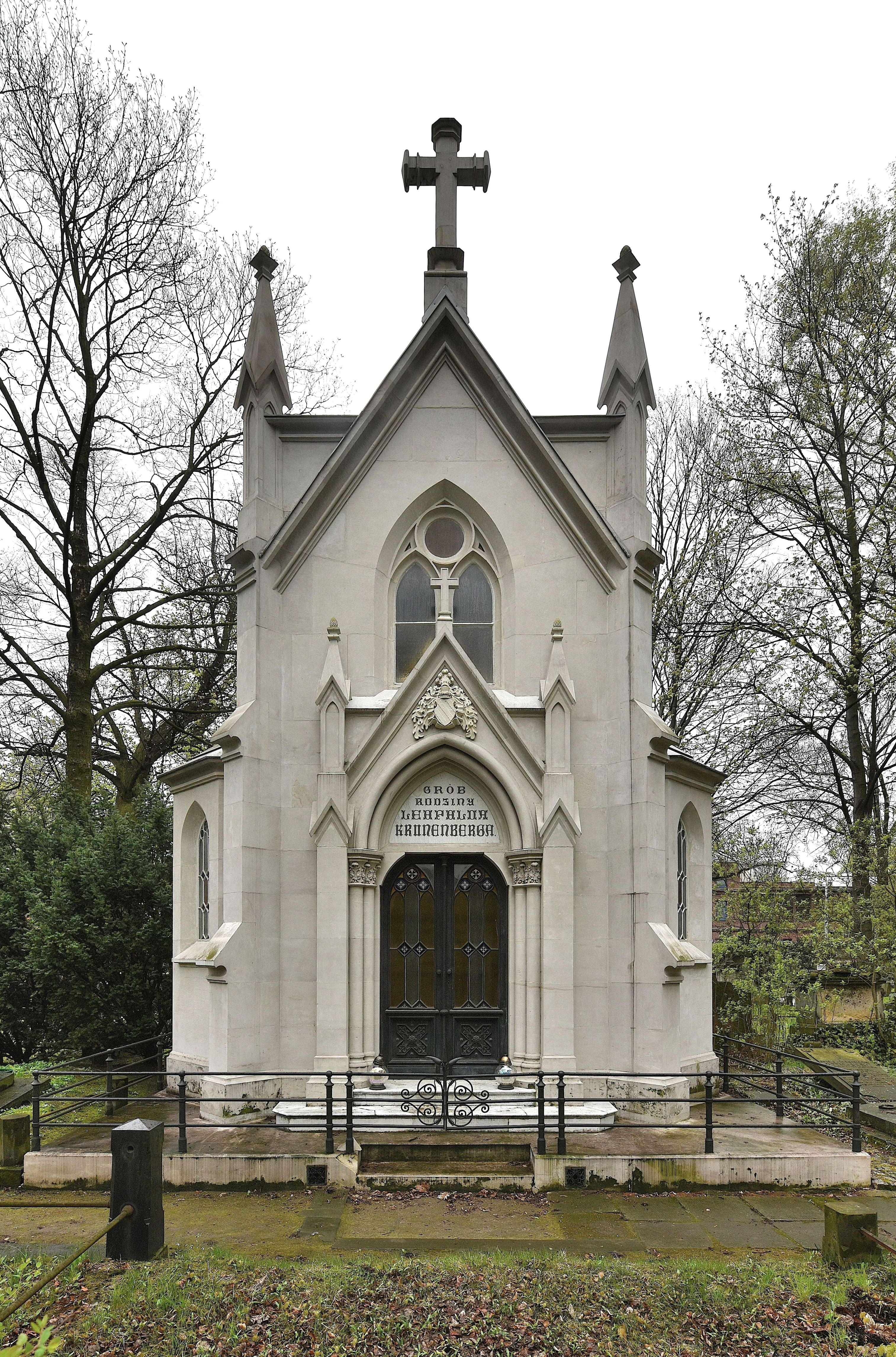 Grób rodziny Leopolda Kronenberga na cmentarzu ewangelicko-reformowanym w Warszawie